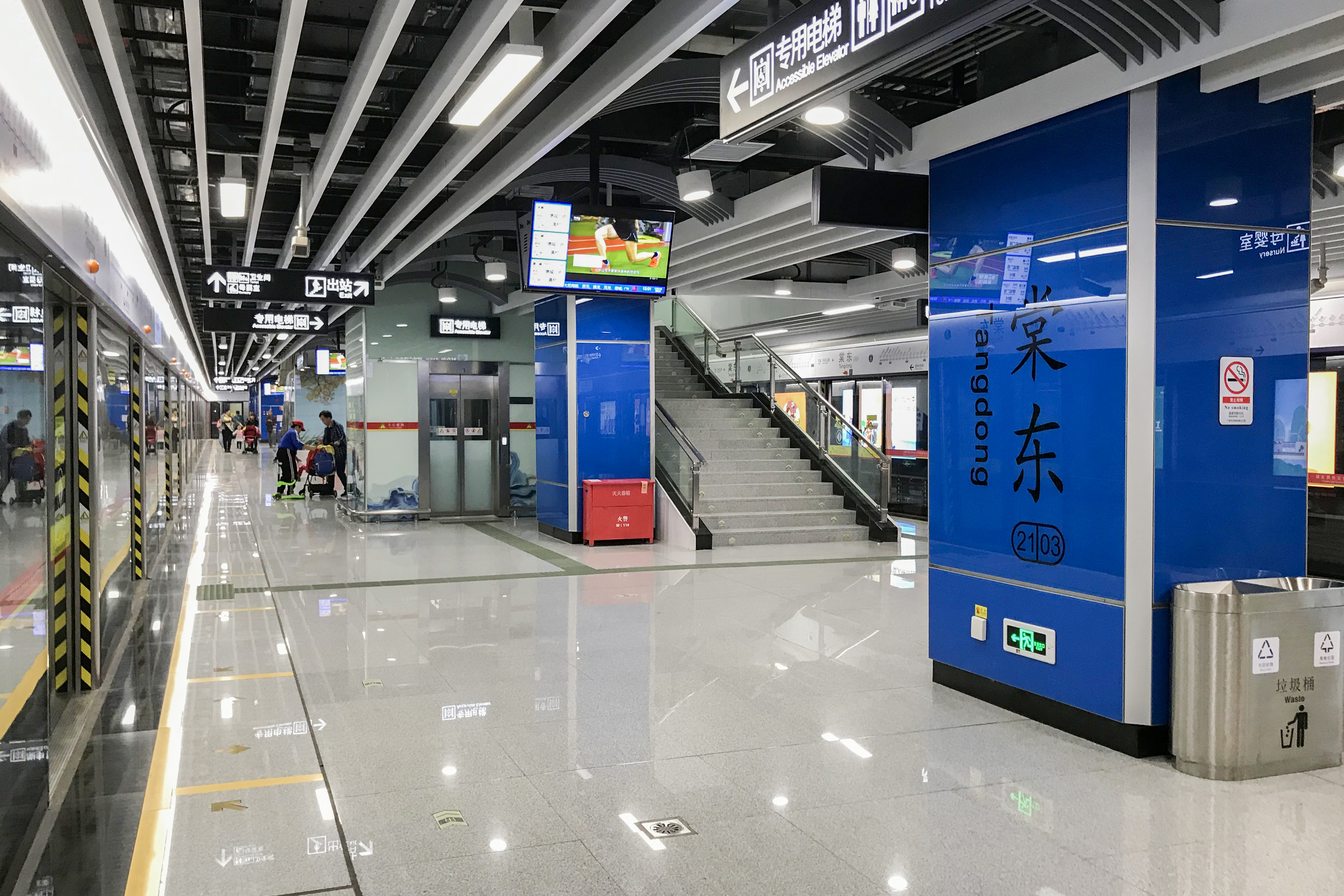 广州地铁棠东站